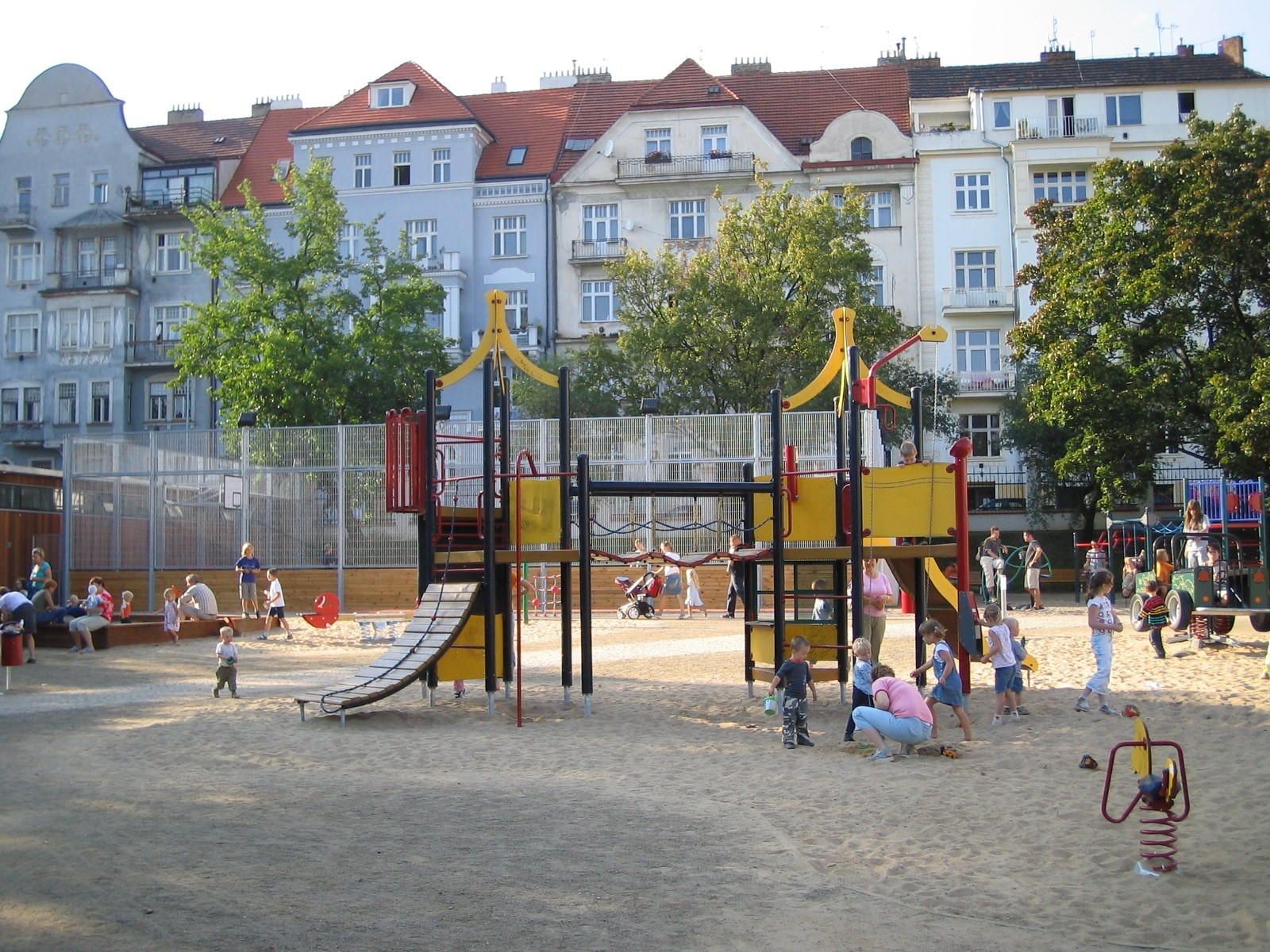 Dětské hřiště v Havlíčkových sadech (Praha, Vinohrady)